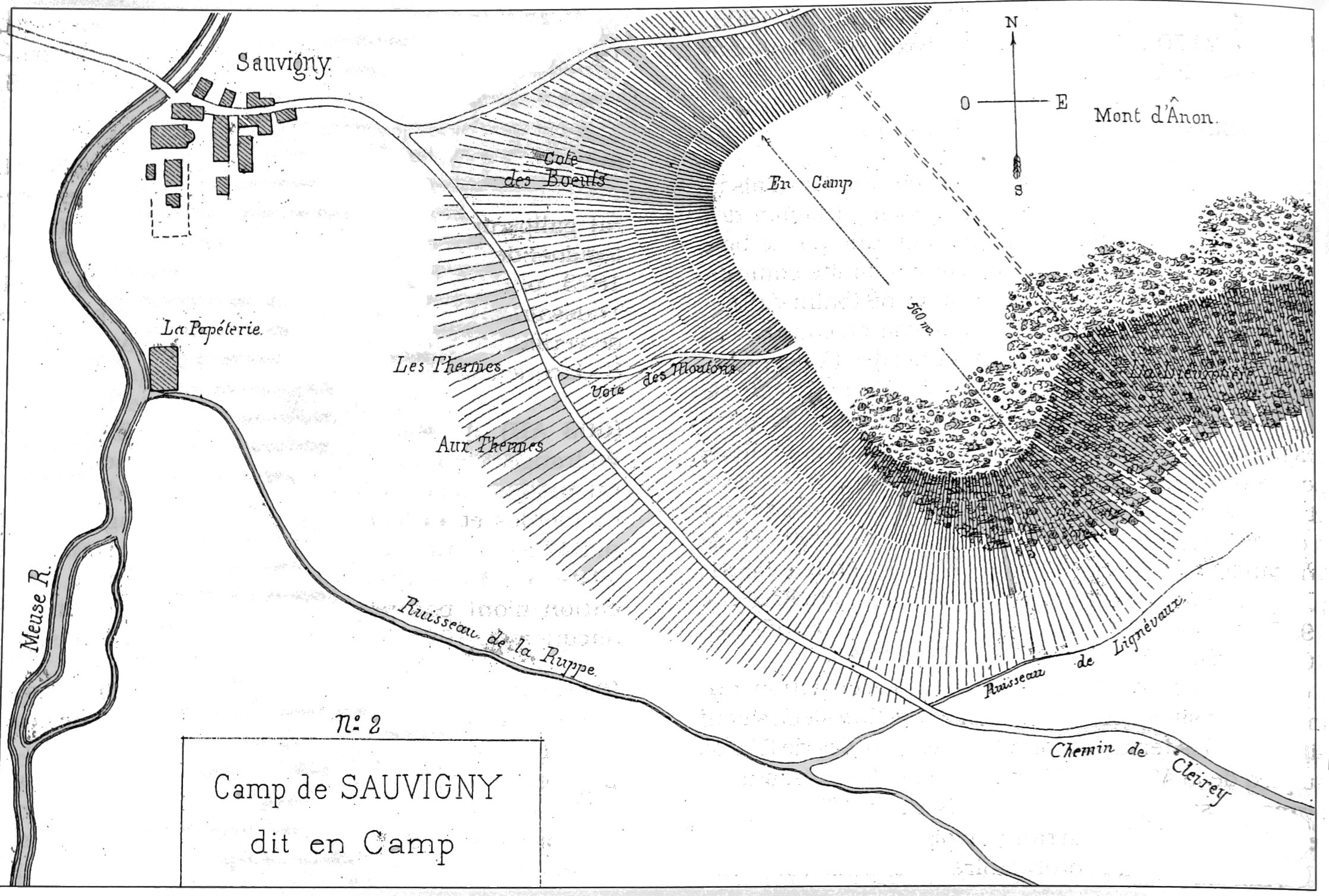 sur une vue ancienne.